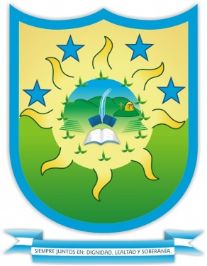 Escudo de la municipalidad de San José de Cerrillos.